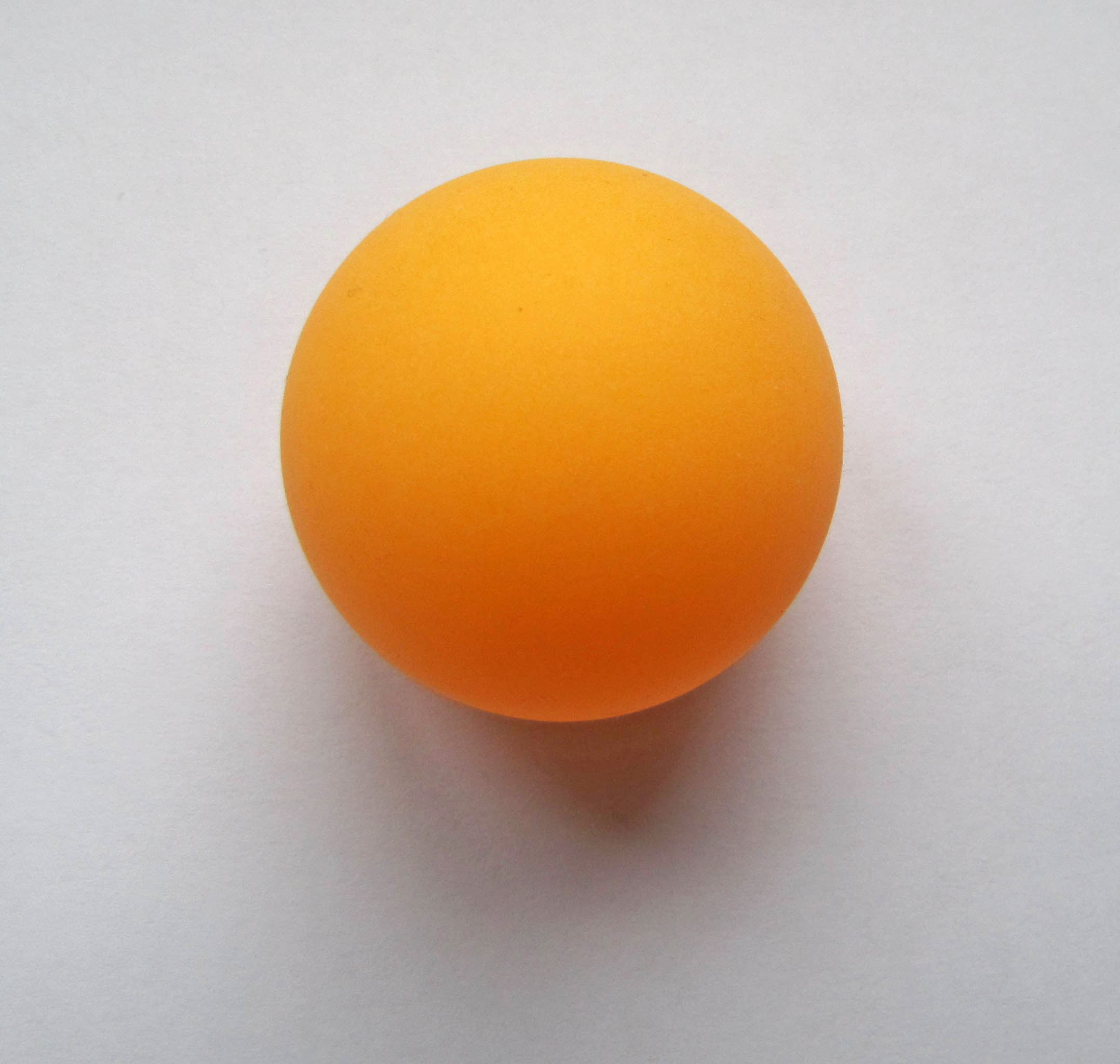 Tischtennisball